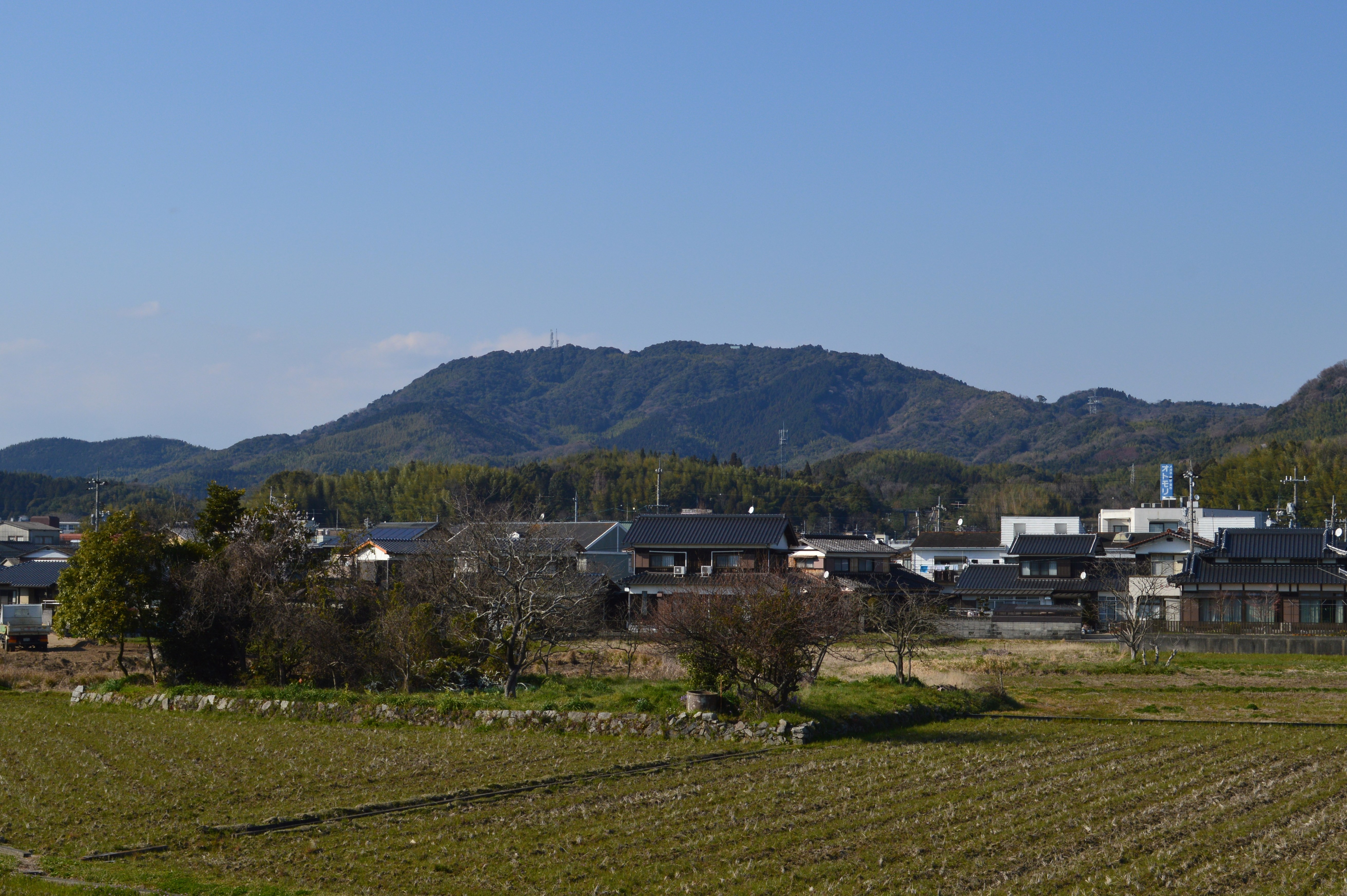 石城山 南方からの遠景